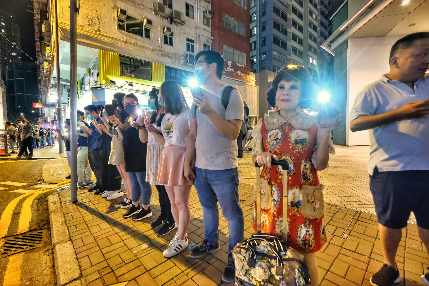 中文（香港）: 香港之路 03